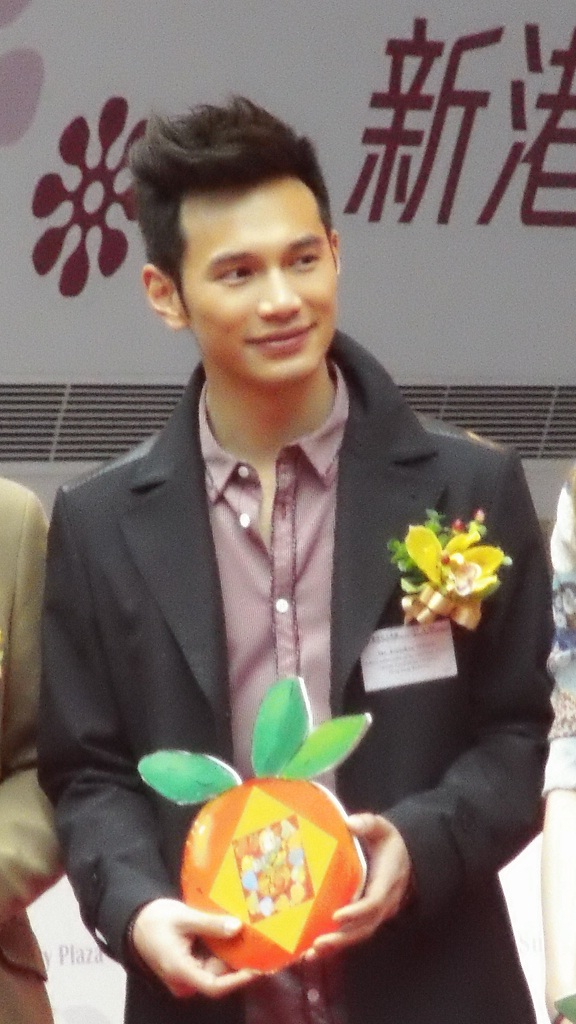 中文（香港）: 王梓軒的樣子